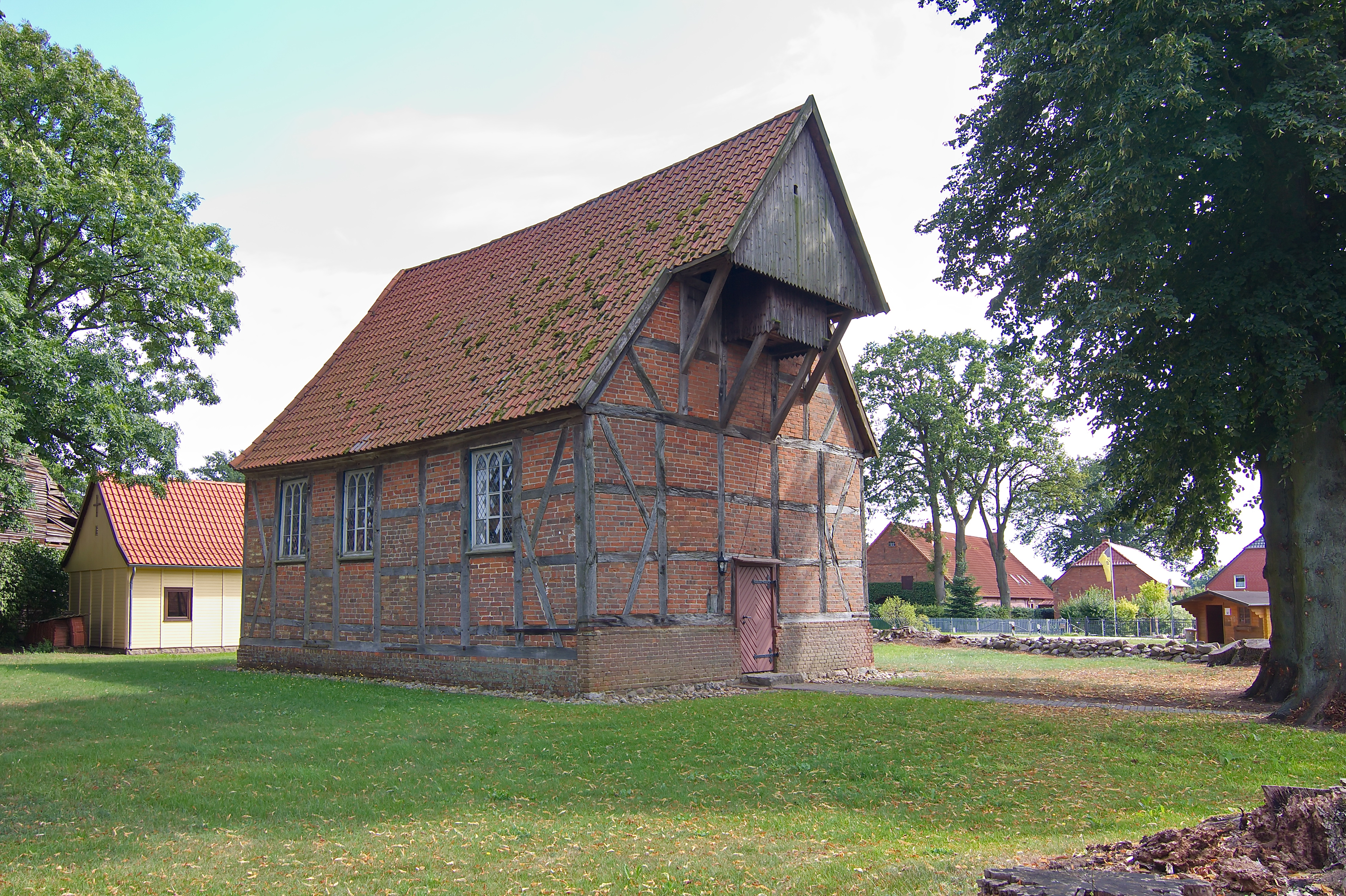 Die 1999 sanierte und renovierte Fachwerkkirche gehört zur Kirchengemeinde Grabow in Mecklenburg-Vorpommern